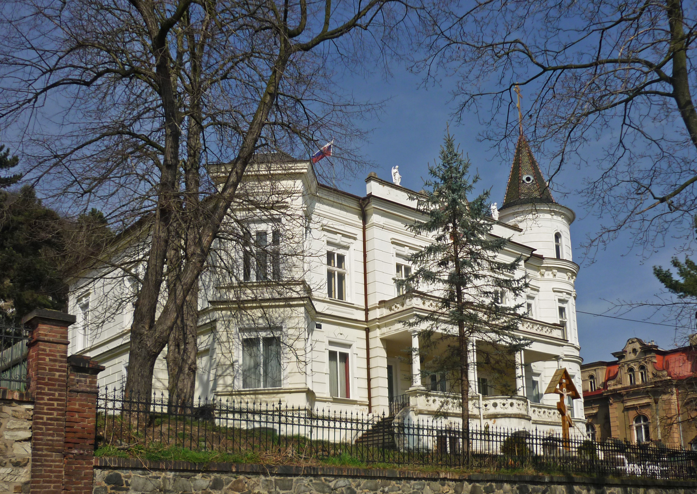 Villa Jan Žižka-Straße 13 in Most (Brüx) – Sitz des orthodoxen Bischofs Izaiáš – Archimandrit Izaiáš (ThDr. Igor Slaninka)